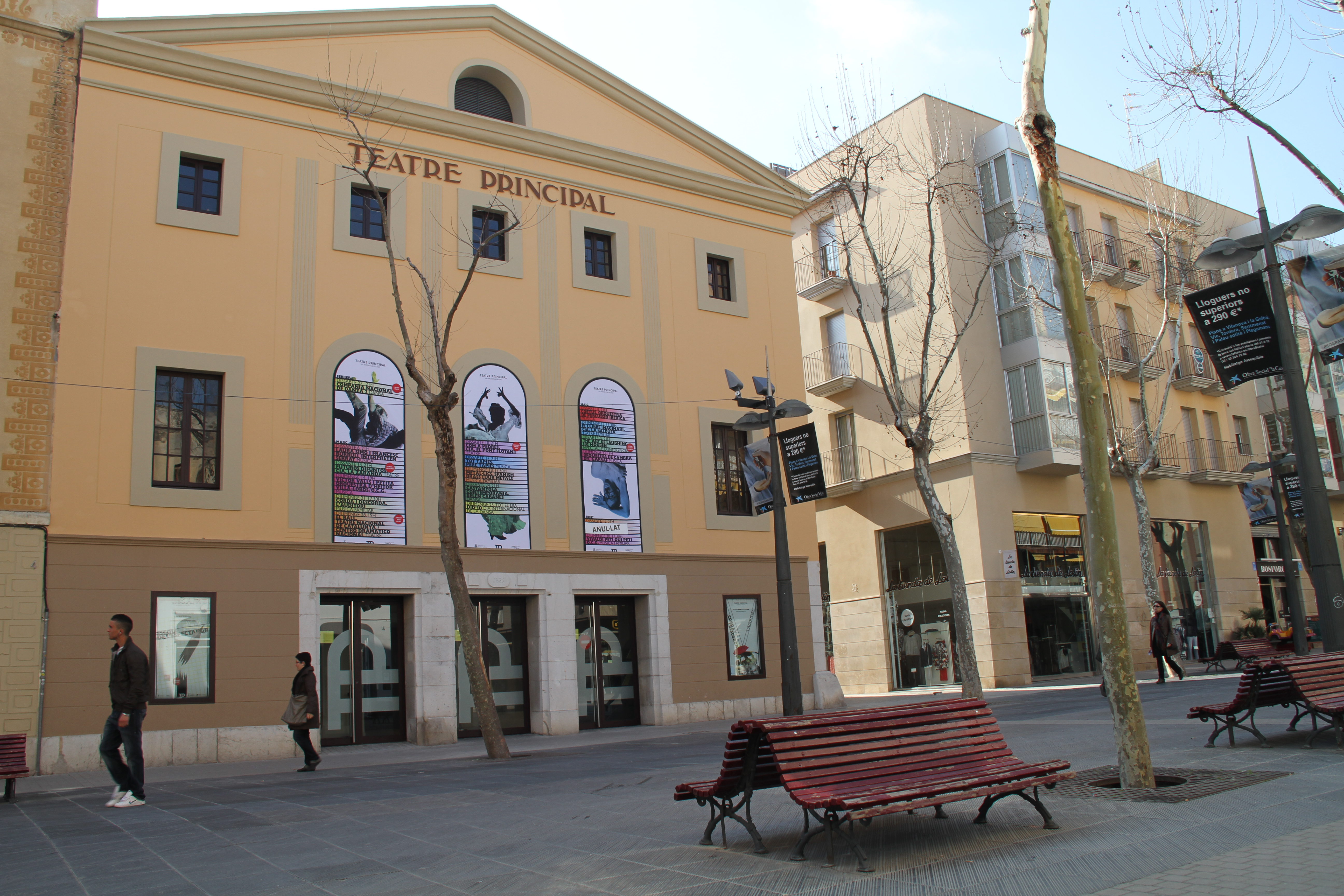 El teatre Principal a la Rambla